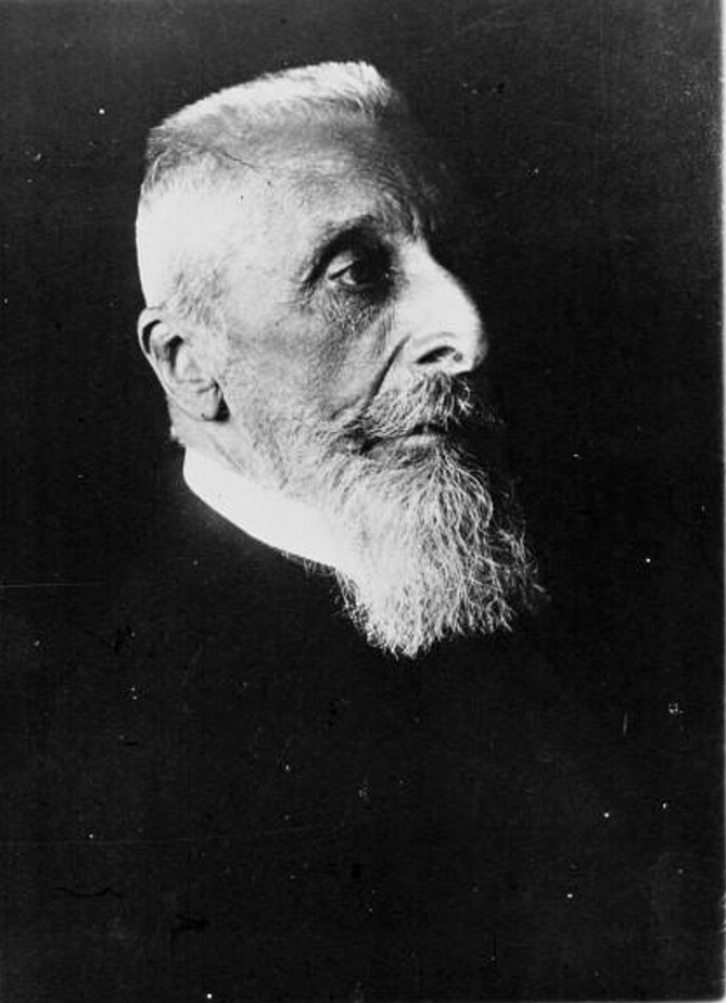 Apponyi Albert, 1933